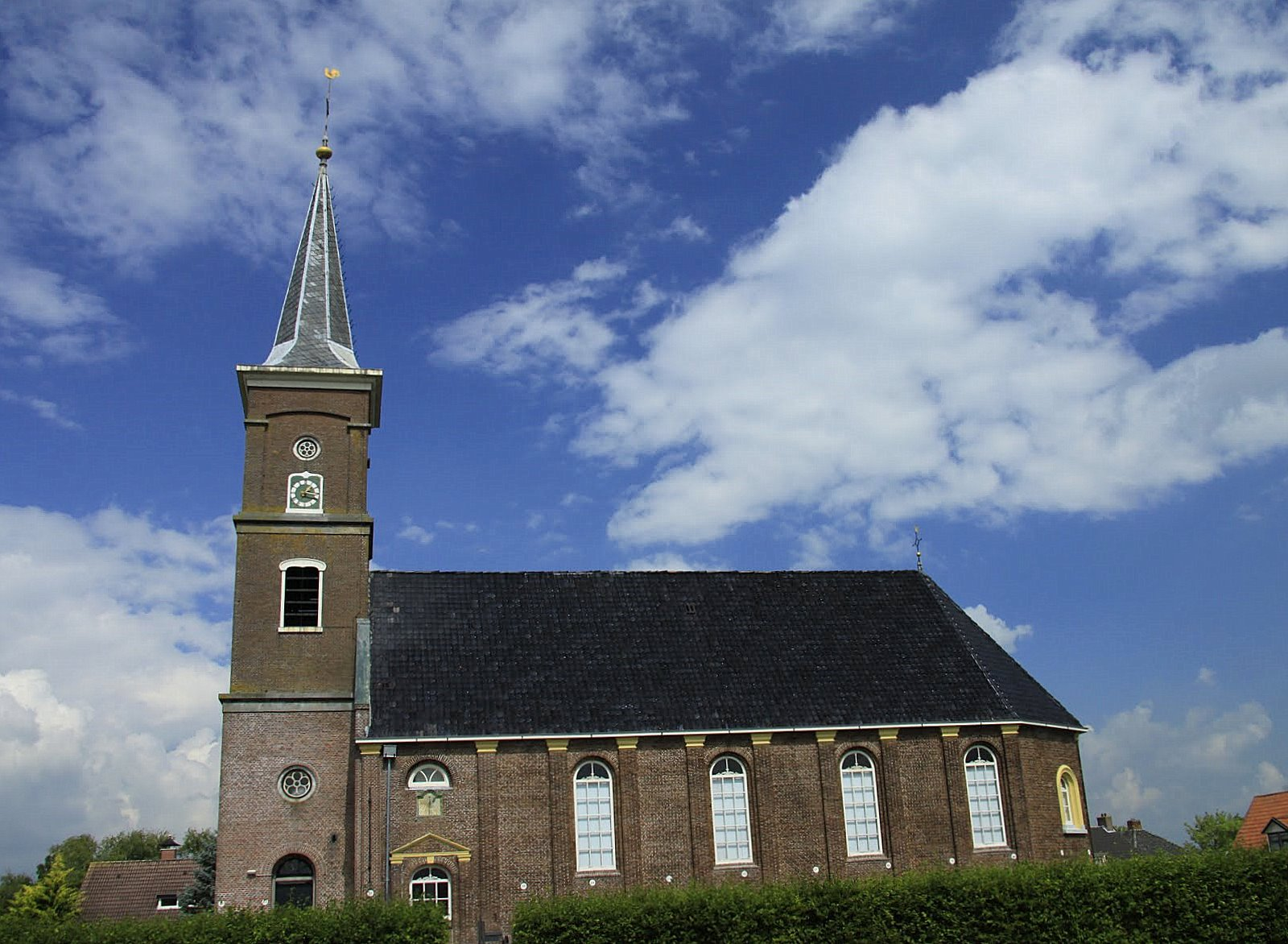 De Nederlands Hervormde kerk uit 1713 in Driesum,. Friesland. Monumenten nummer 11684